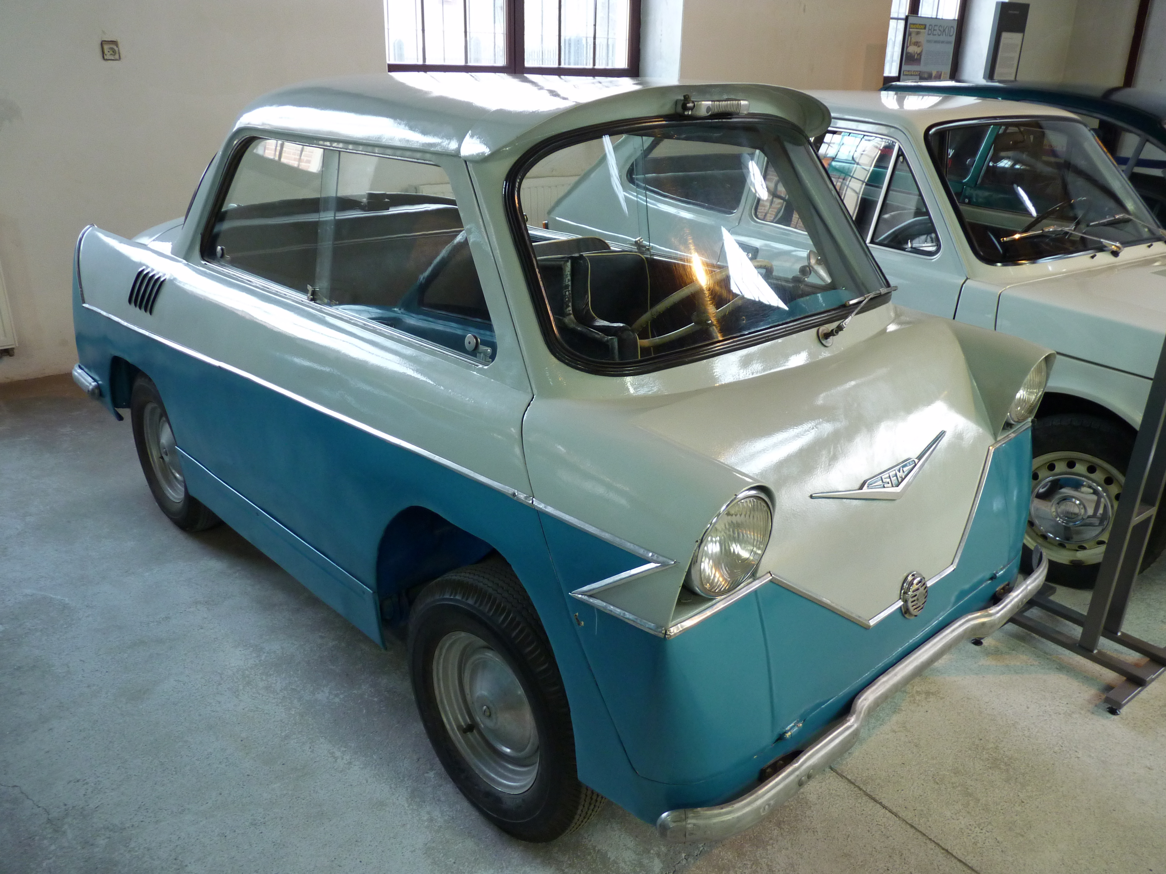 Smyk at Muzeum inżynierii Miejskiej in Kraków.